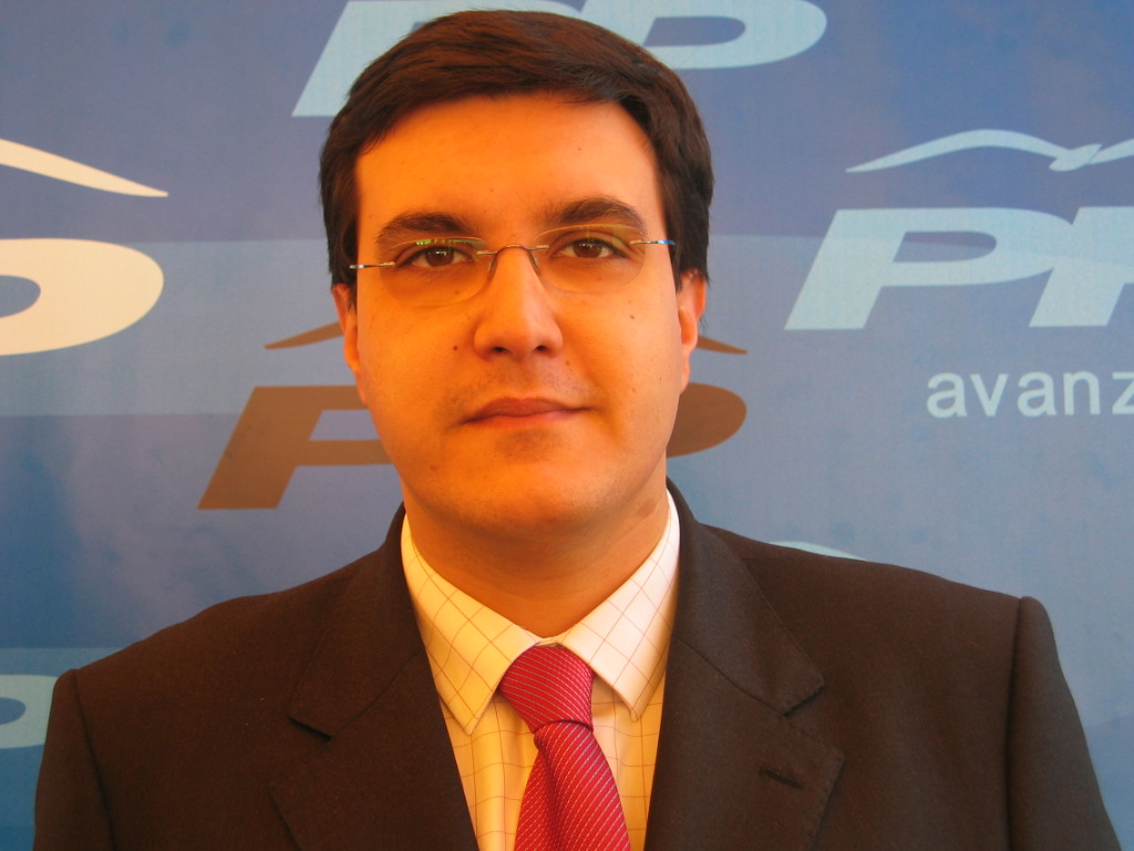 José Luís Ayllón